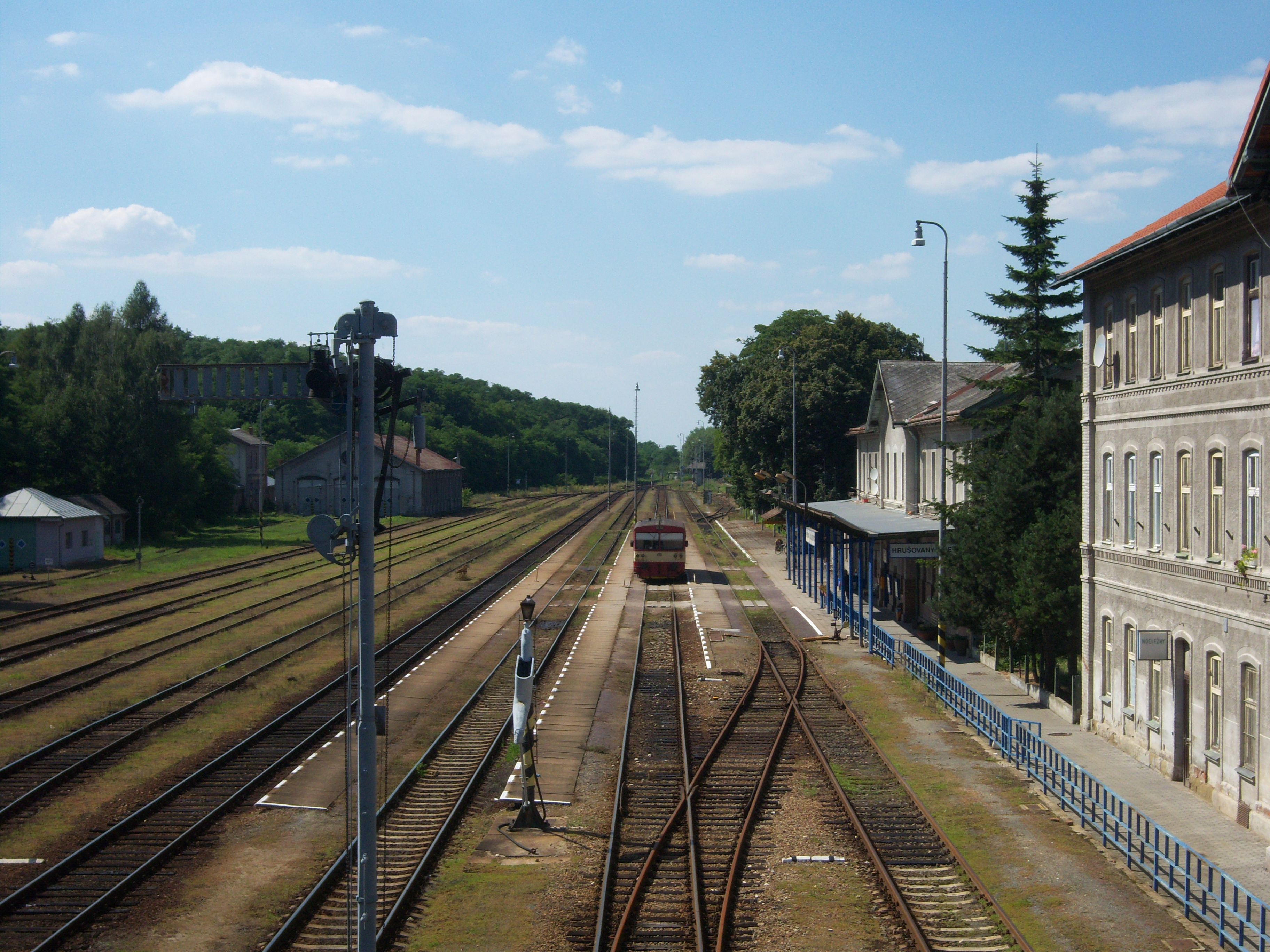 Nádraží Hrušovany nad Jevišovkou